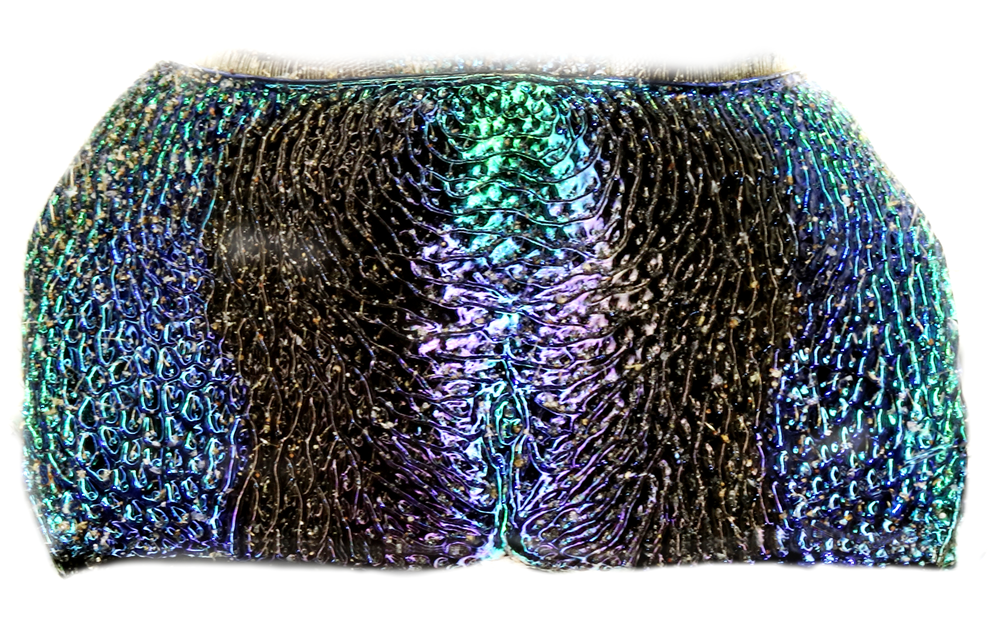 Pronotum eines beschädigten Totfundes von Anthaxia passerinii vom Peloponnes im Mai 2016